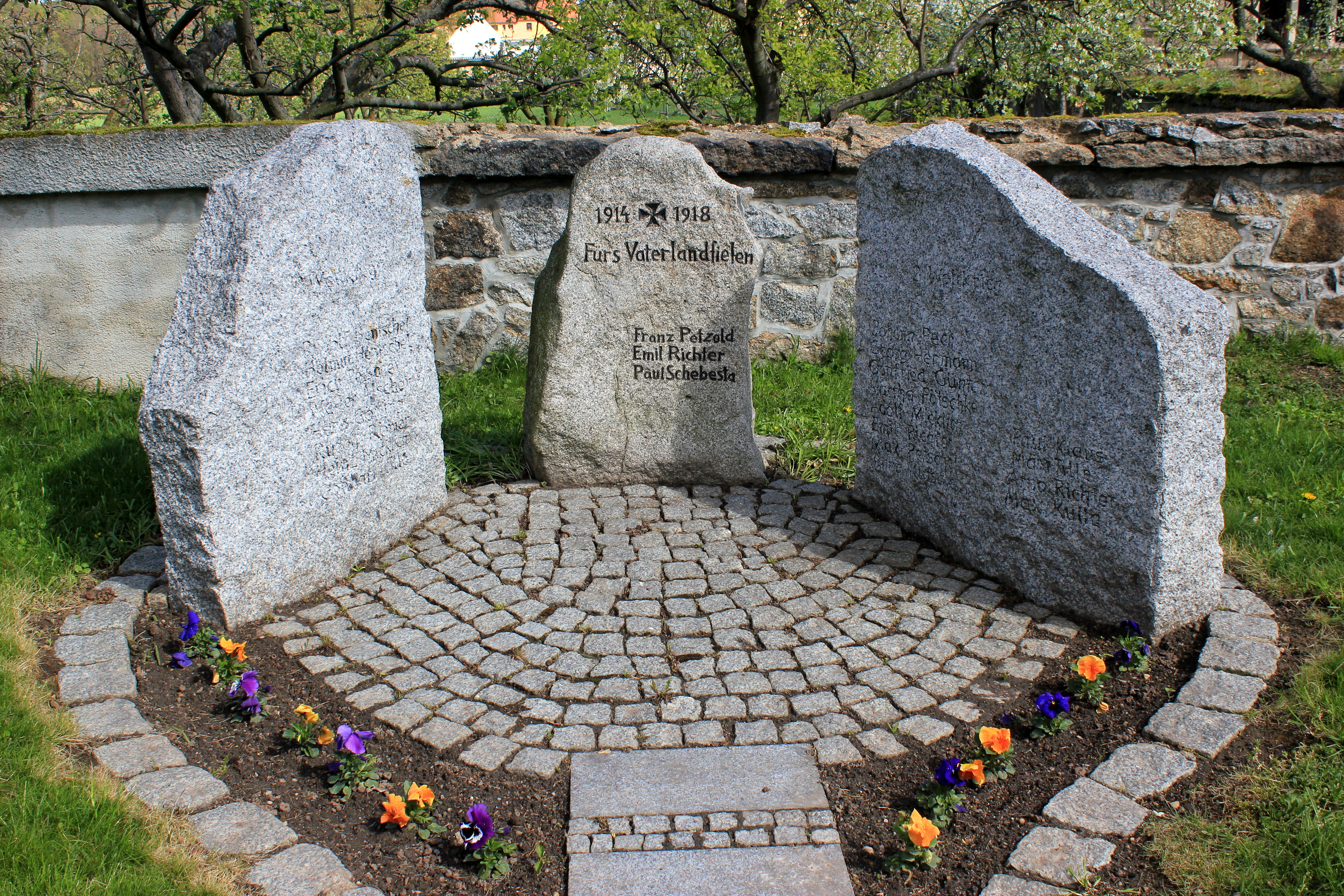 Hornjoserbsce: Wojerski pomnik w Krěpjecach.